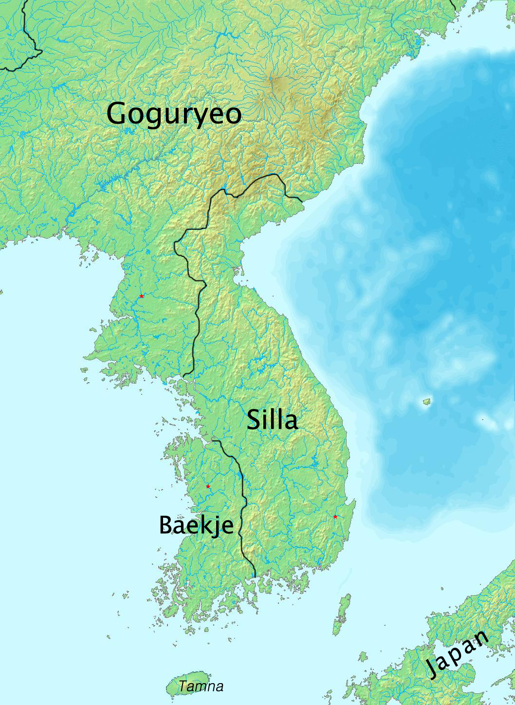 La massima estensione di Silla nel 576 d.C. (prima dell'Unificazione Silla). Kiswahili: Historia ya Korea.